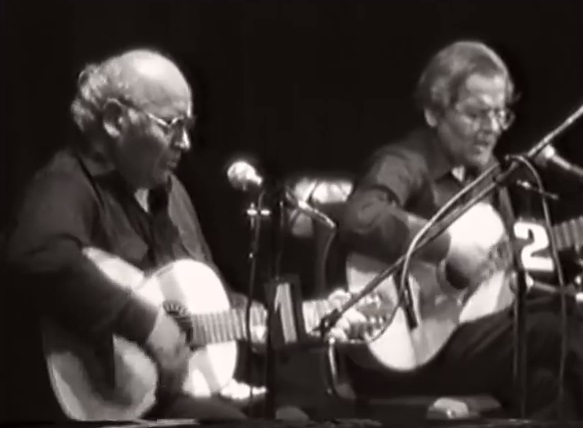 Los Hermanos Núñez en el Teatro Alberdi, Tucumán